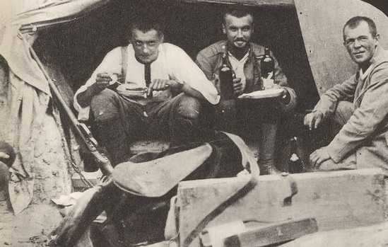 Szałas w okopie. Od lewej: ppor. Szul, ppor. Czaderski, chor. Julian Ossowski.